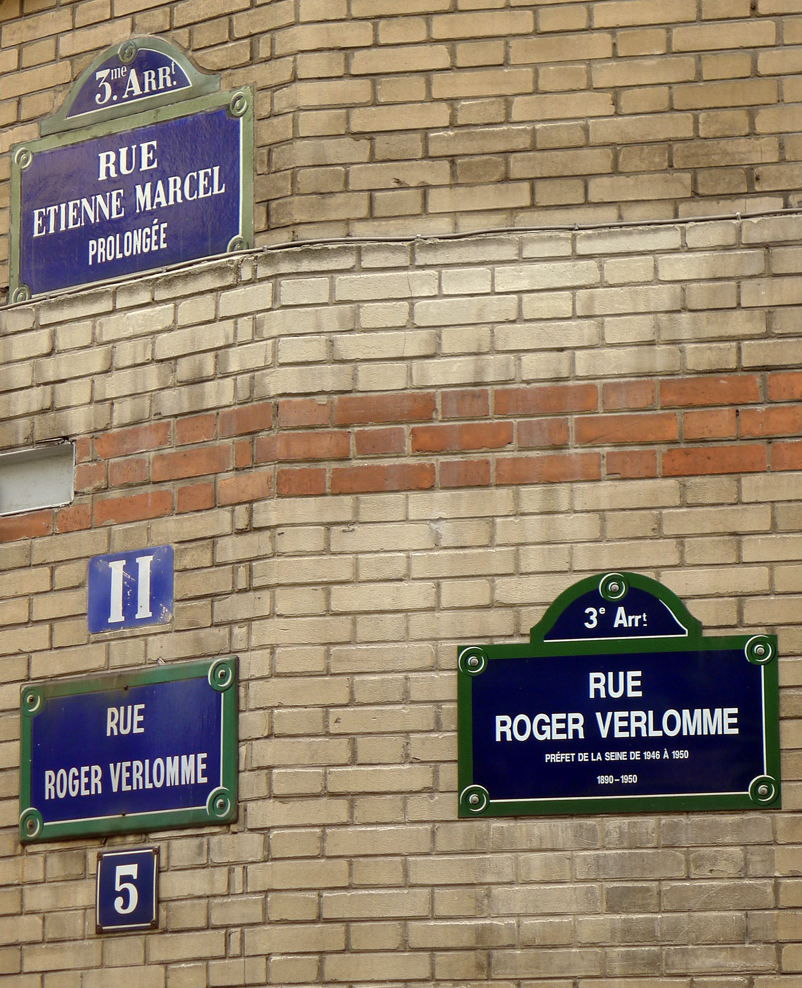 Rue Roger-Verlomme (plaque avec ancien nom) - Paris III